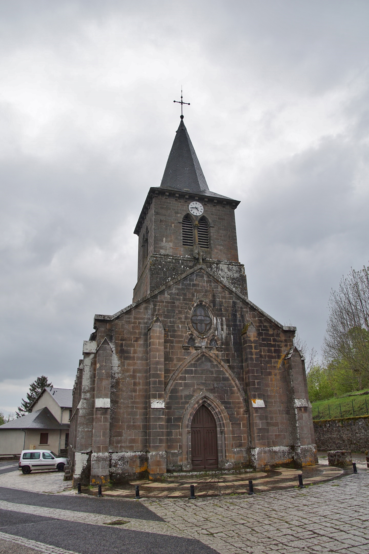 Puy de Dôme